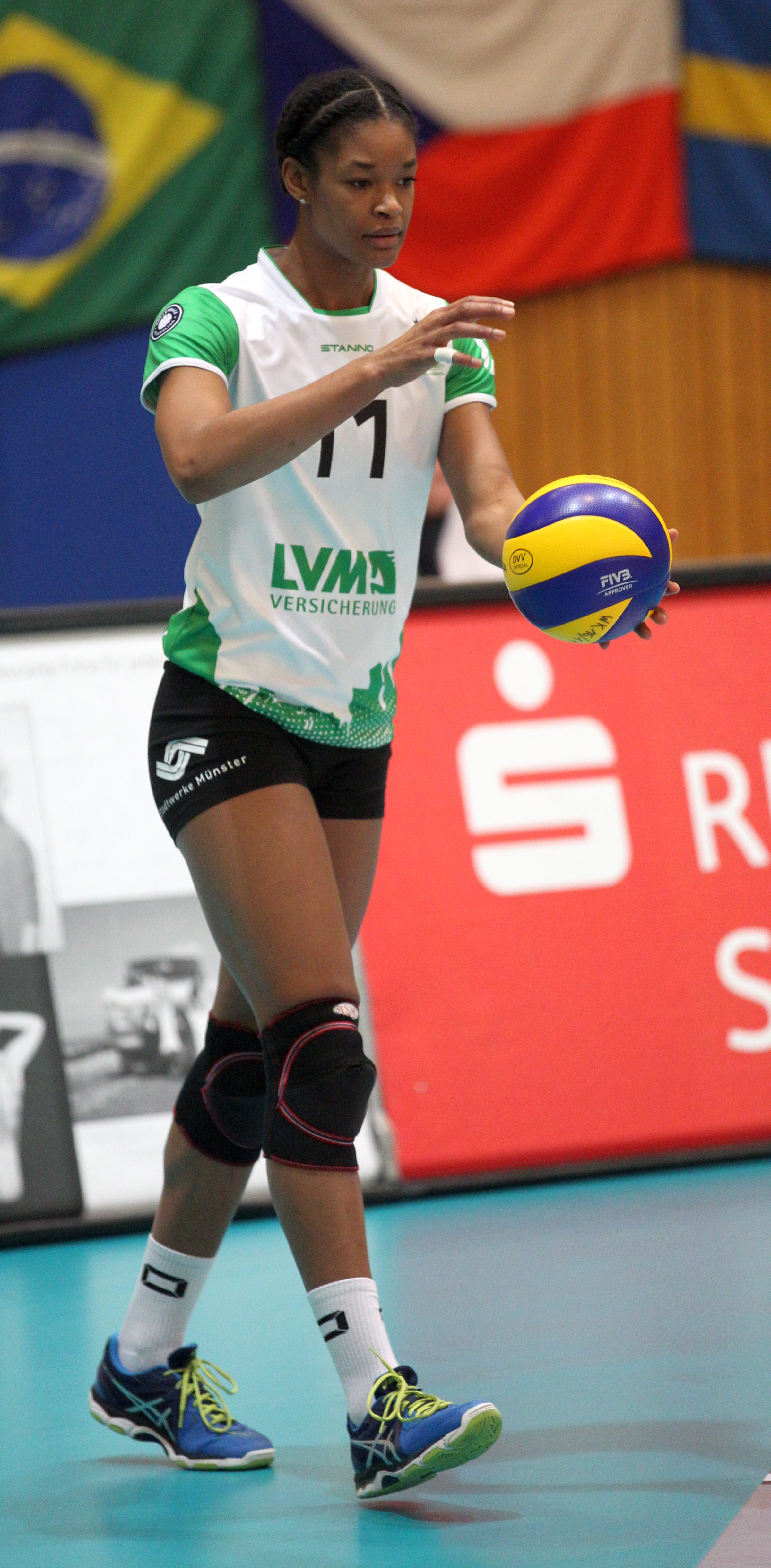 Erica Wilson (USC Münster)